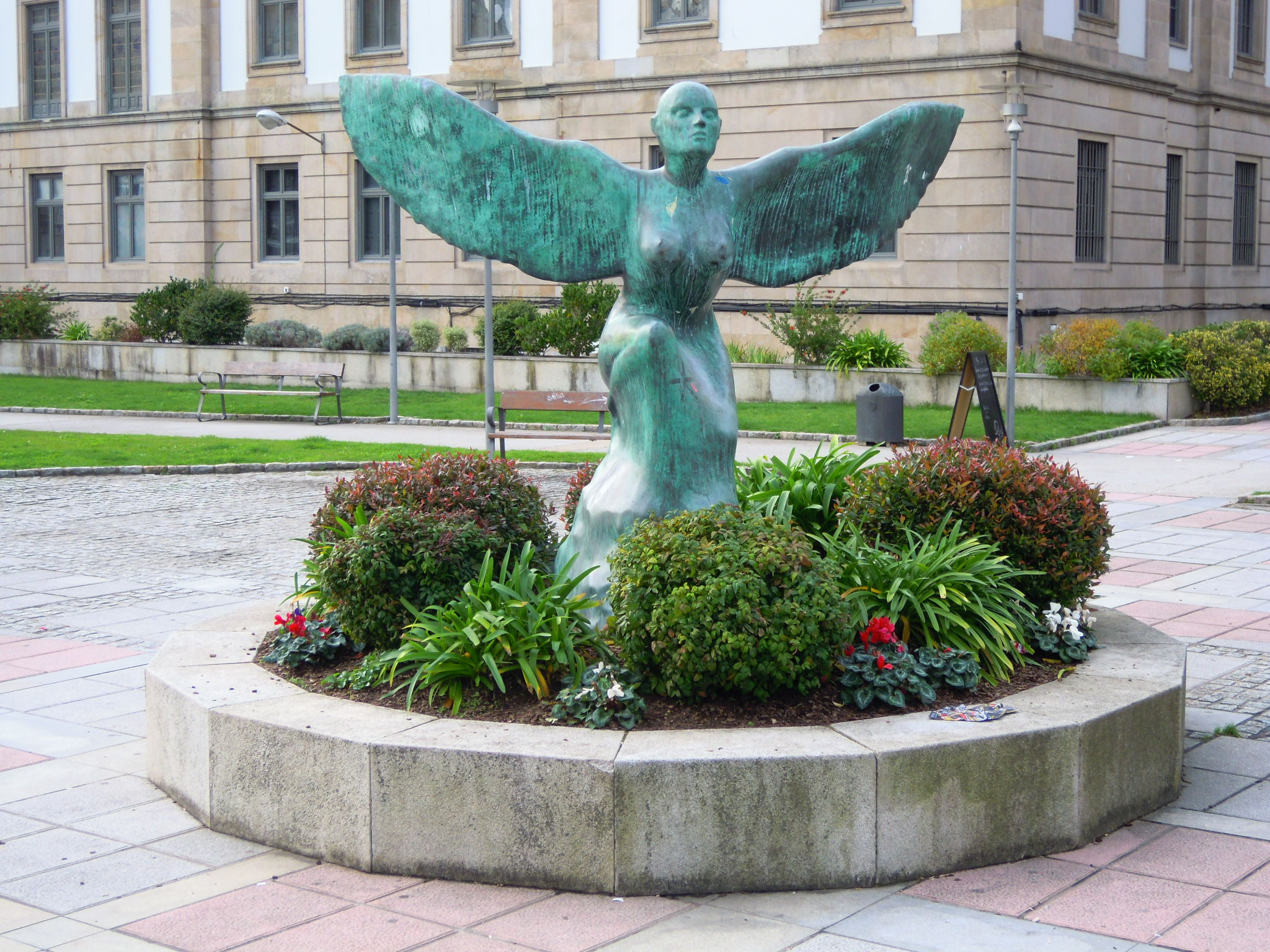 Escultura na praza da Liberdade de Pontevedra